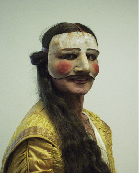 Maschera in gomma lattice realizzata per l'opera teatrale "Arlecchino servitore di due padroni" anno 2004